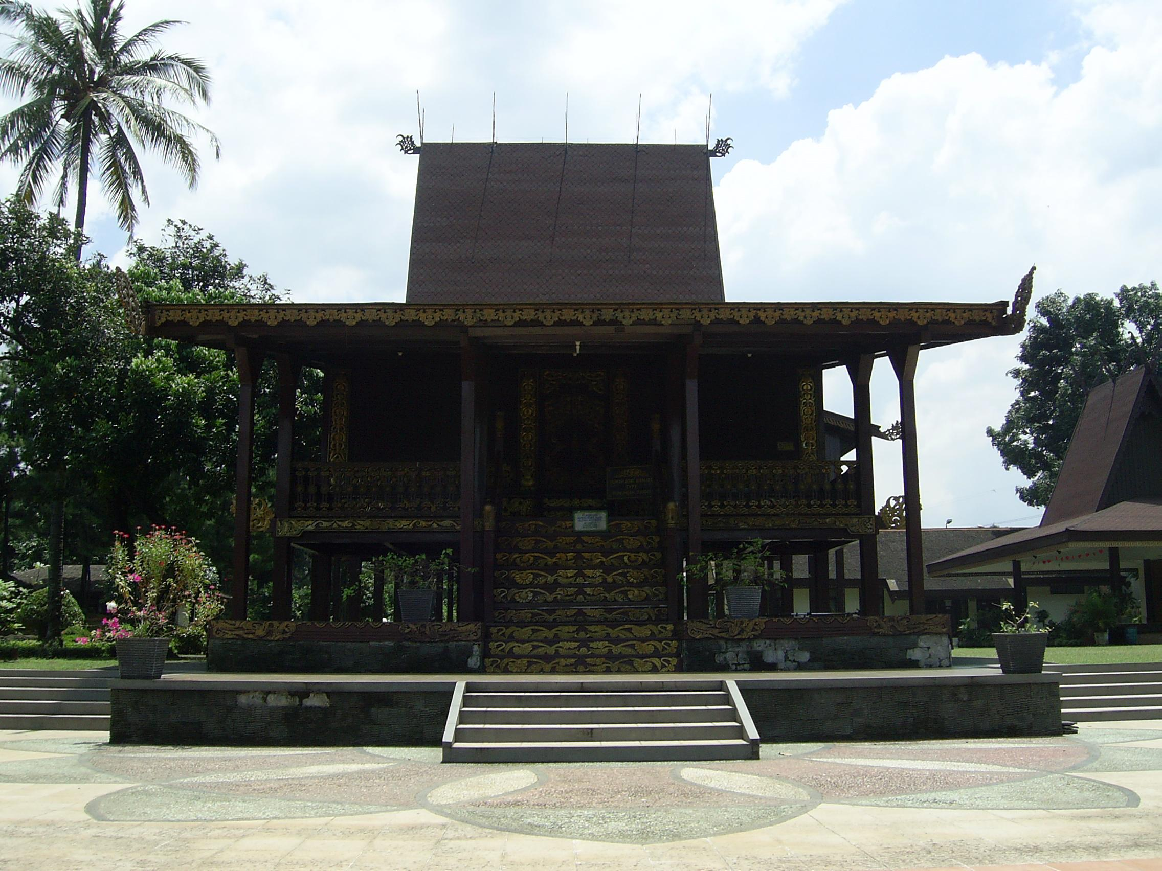 Rumah Bubungan Tinggi Anjungan Kalsel TMII Jakarta